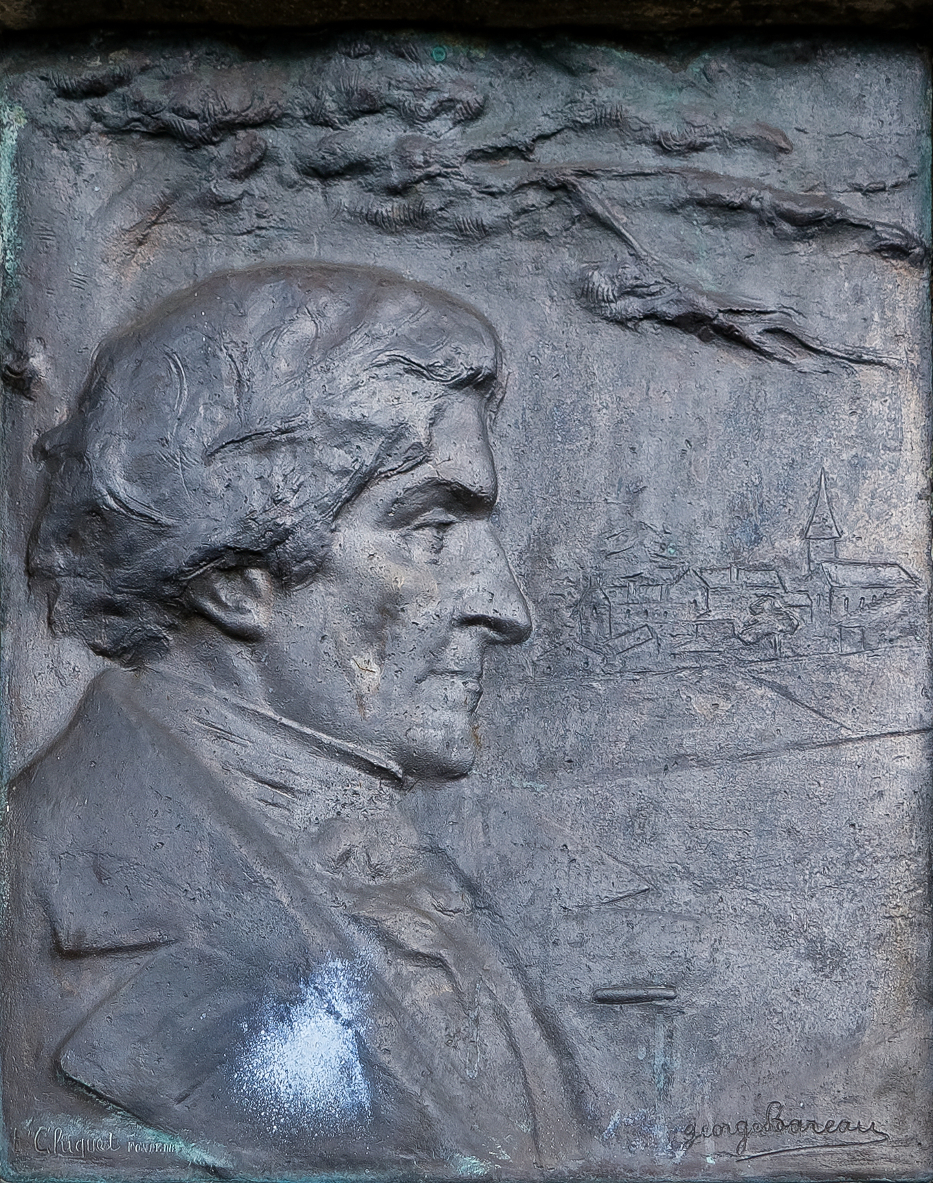 Plaque commémorative en hommage à Jules Michelet sculptée par Georges Bareau, boulevard Michelet (Nantes, Loire-Atlantique, Pays de la Loire, France)